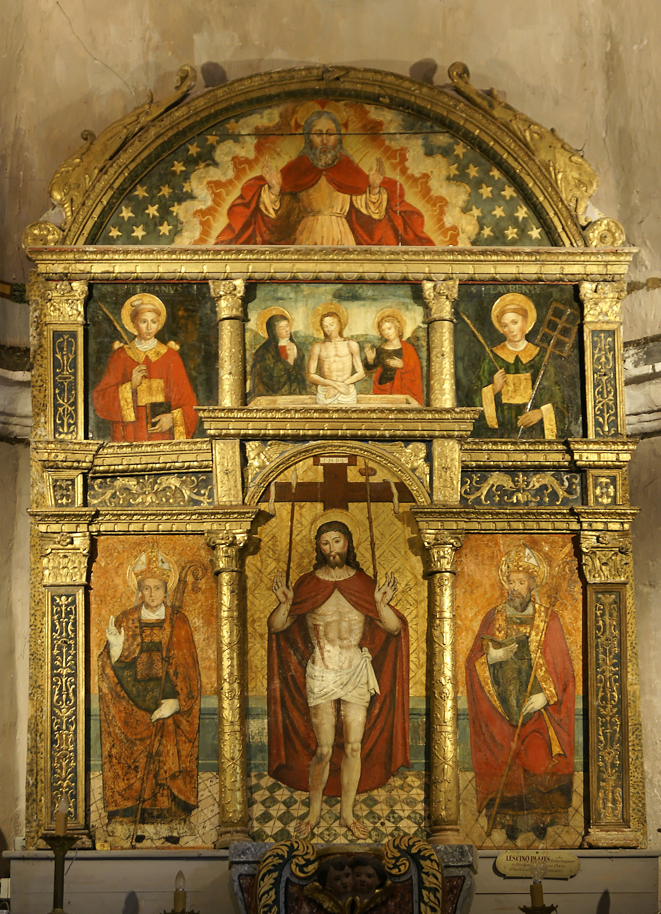 Eglise St-Nicolas - Rétable du Christ aux 5 plaies Attribué à Francesco Brea - (1524)